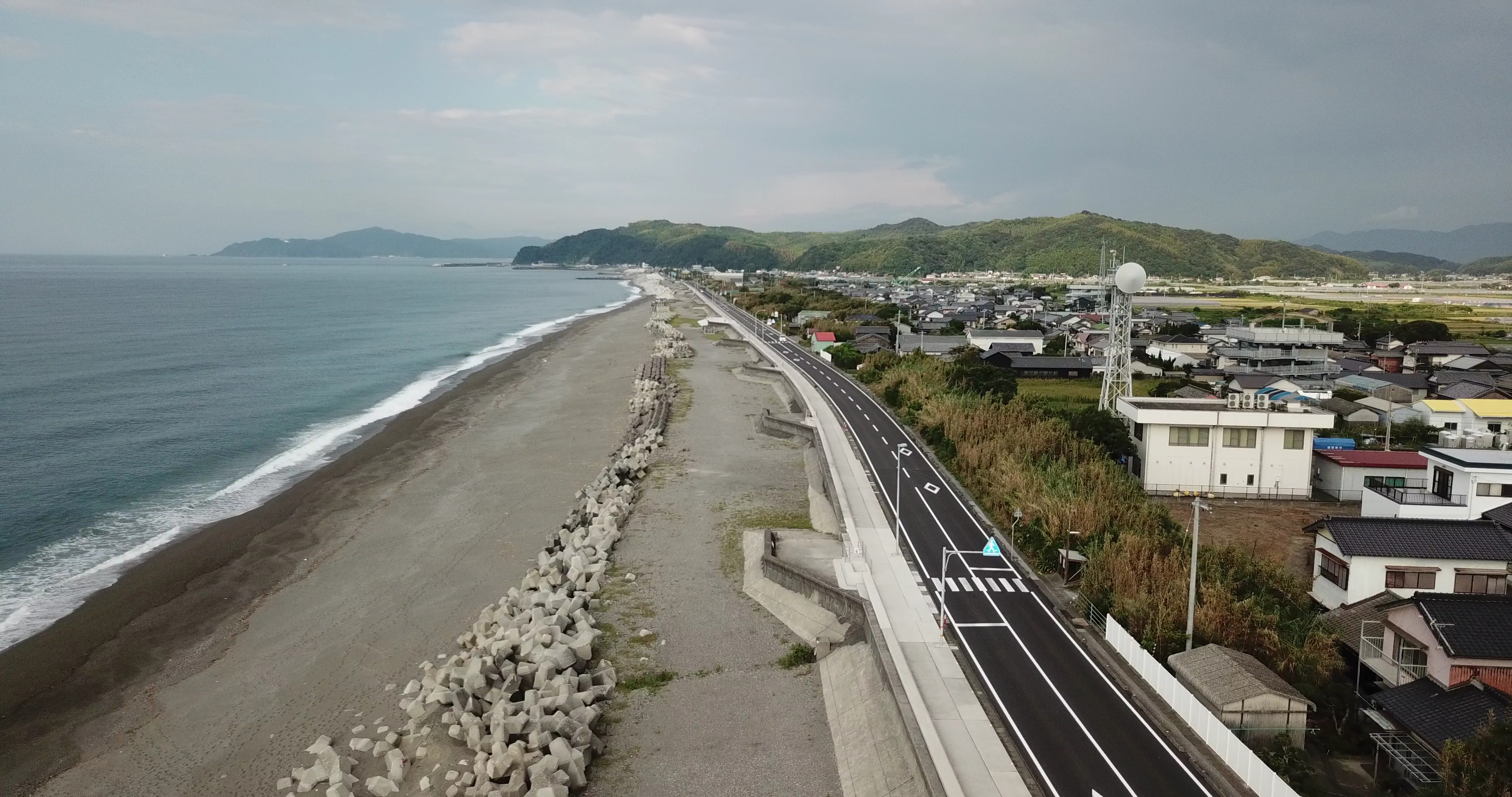 高知市春野町海岸の様子